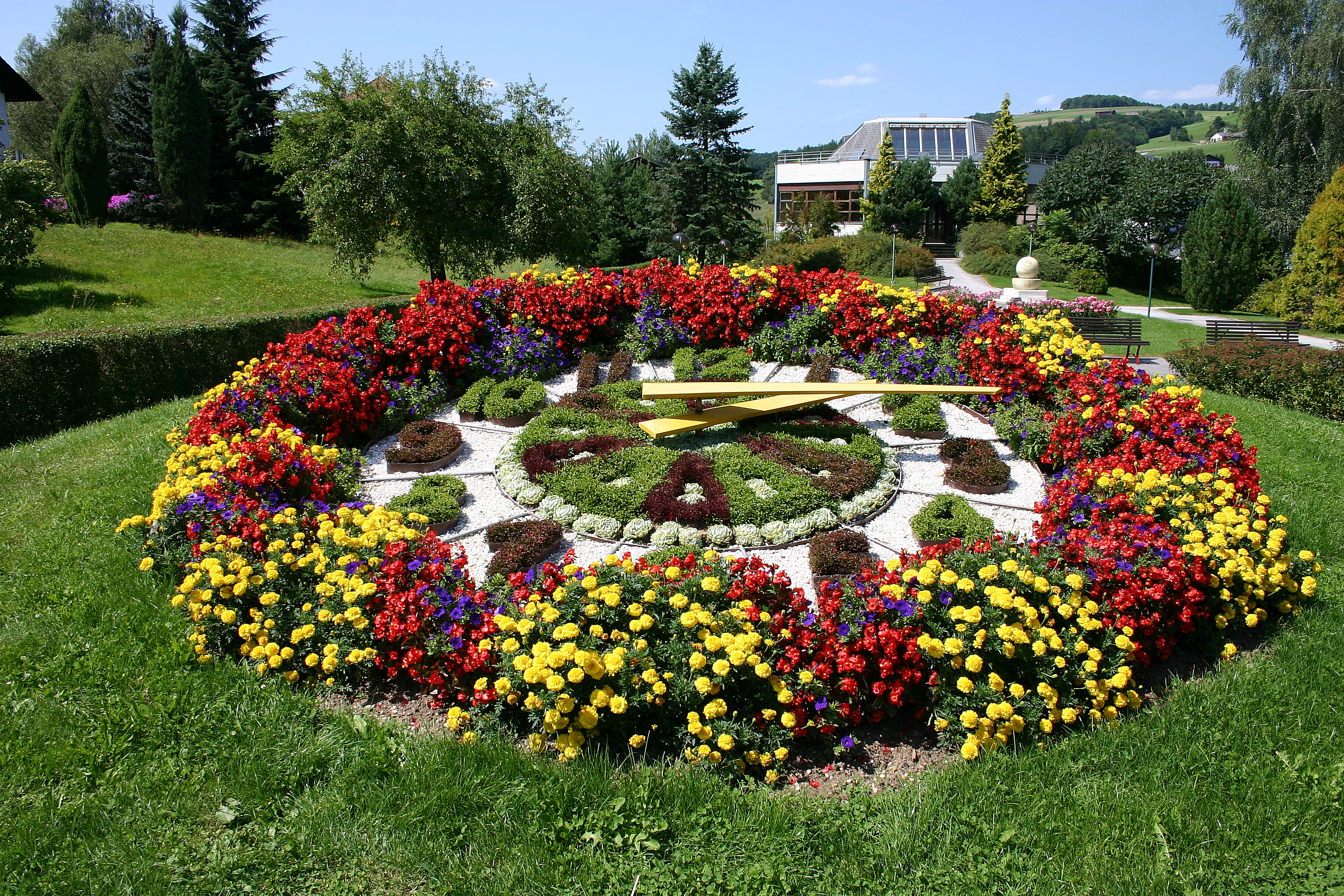 Bad Schönau Blumenuhr